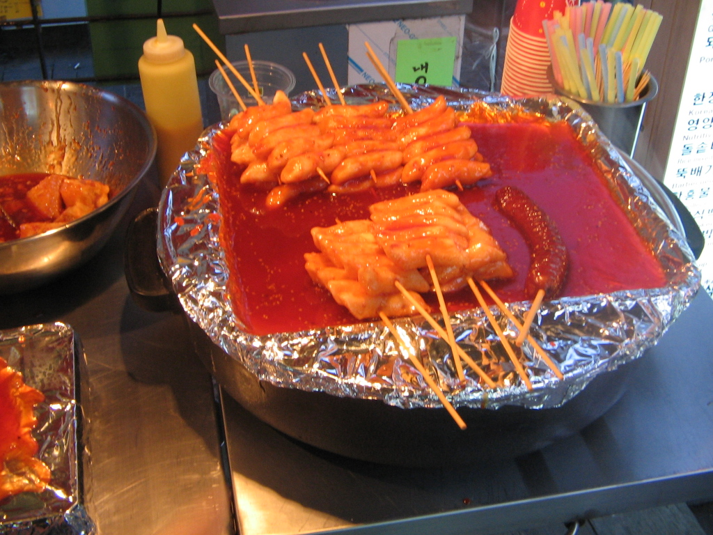 떡꼬치